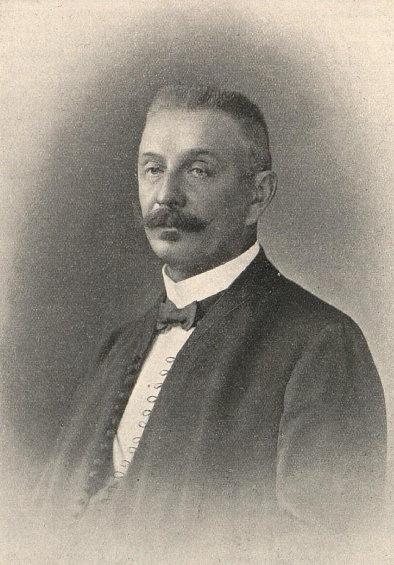 Jan Rataj (1855-1915), rakouský a český zemědělec a politik